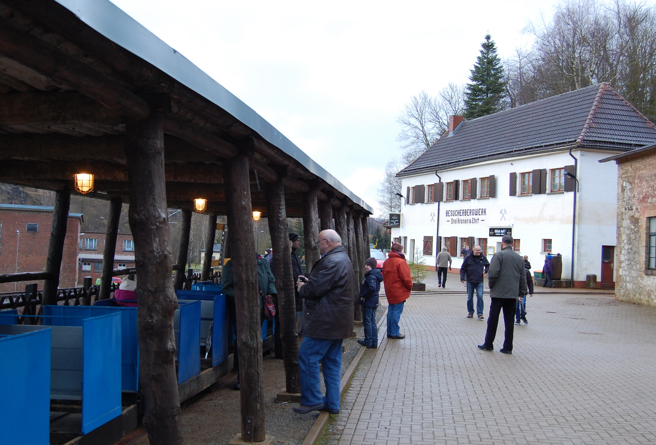 Besucherbergwerk Drei Kronen und Ehrt, Zug für Besucher, kurz vor Einfahrt